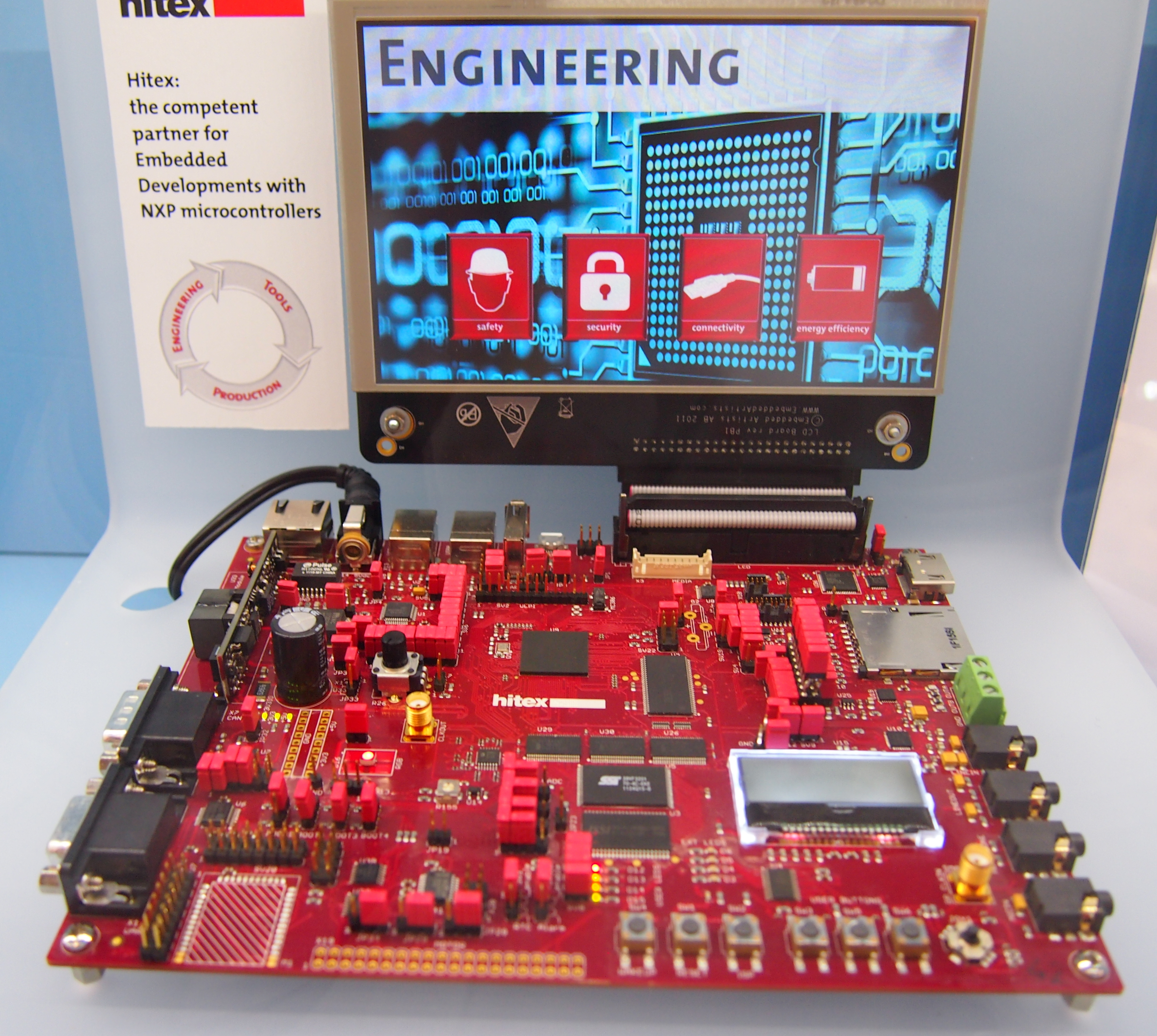 Embedded World 2014: Hitex DSC Developer Board mit NXP LPC 4330, 65MB SDRAM, 512kB Ram auf Basis eines Cortex M4 mit max. 204 MHz